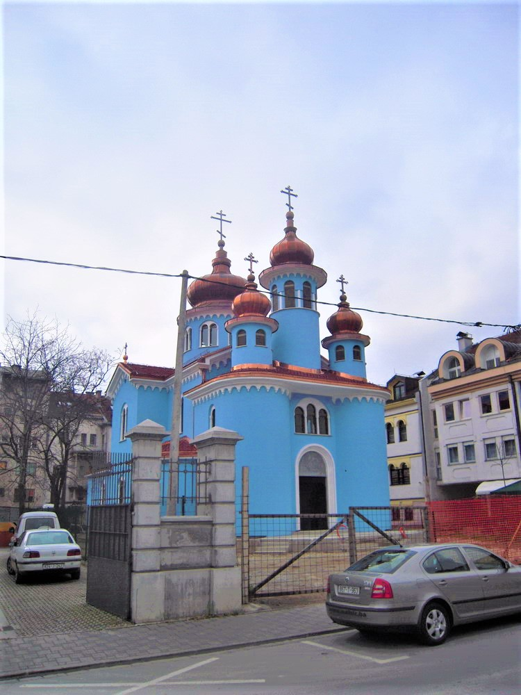 Ukrajinska grkokatolička crkva Hrista Carja